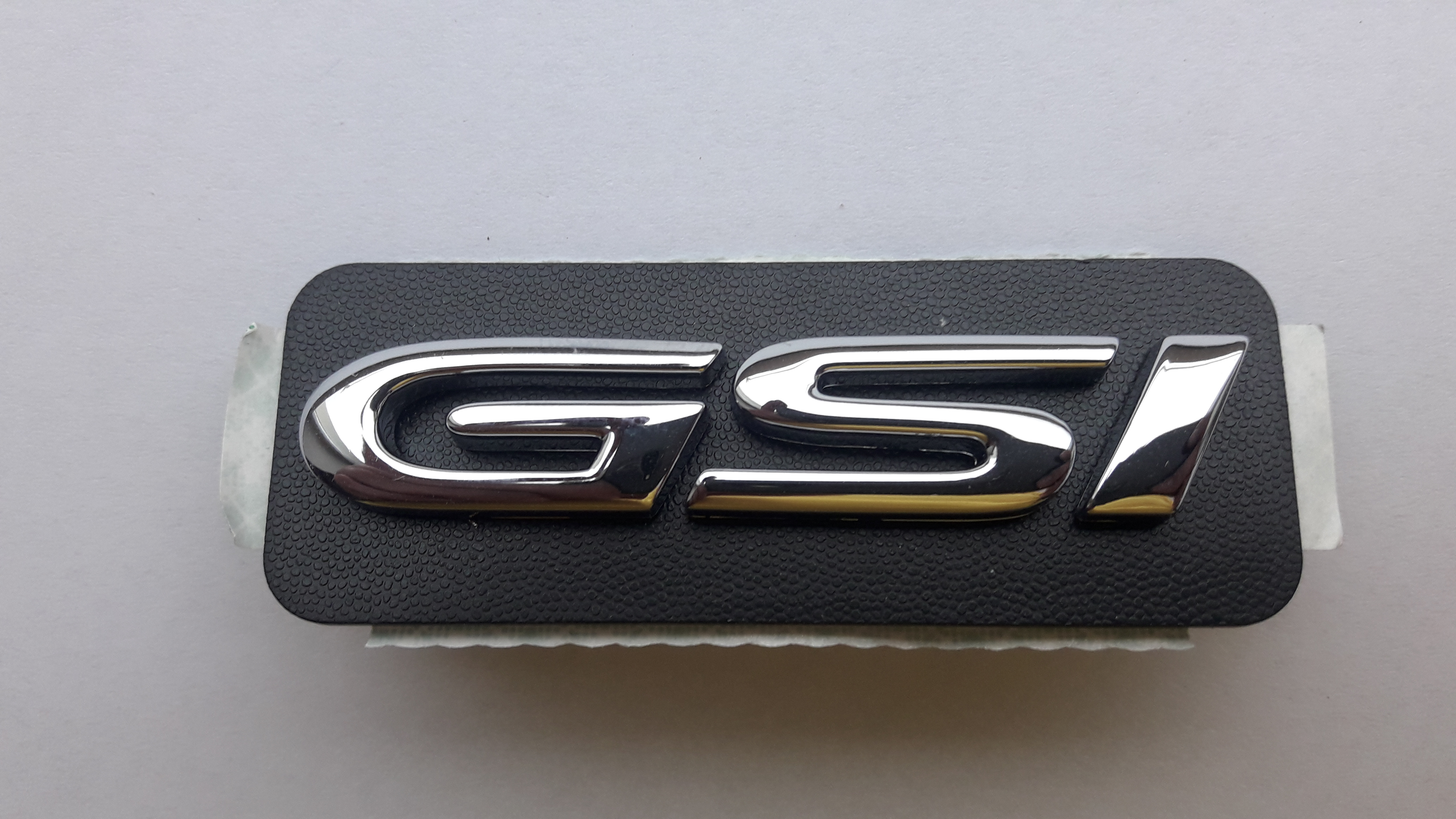 samsung